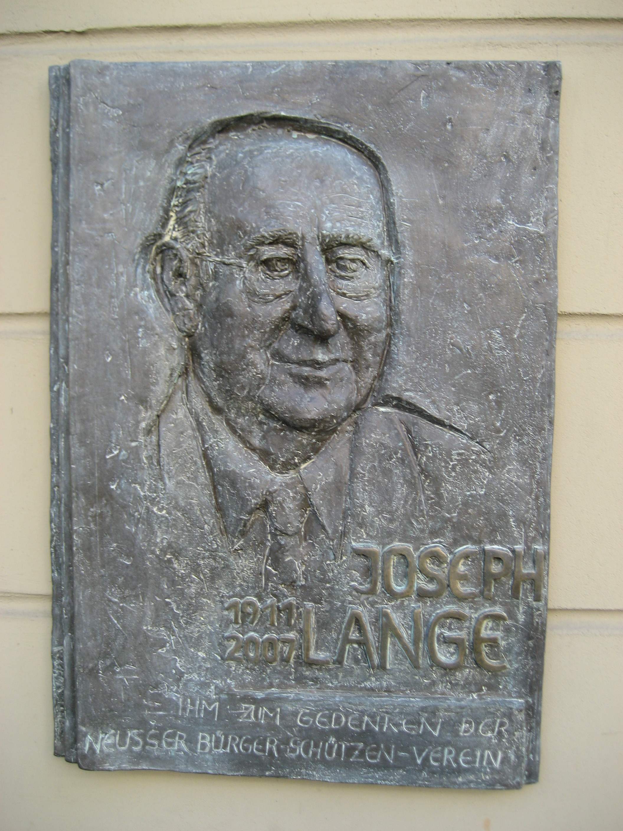 Detail an Haus Rottels. Aufnahme von 2008. Gedenktafel für den Historiker und Neusser Stadtarchivar Joseph Lange.